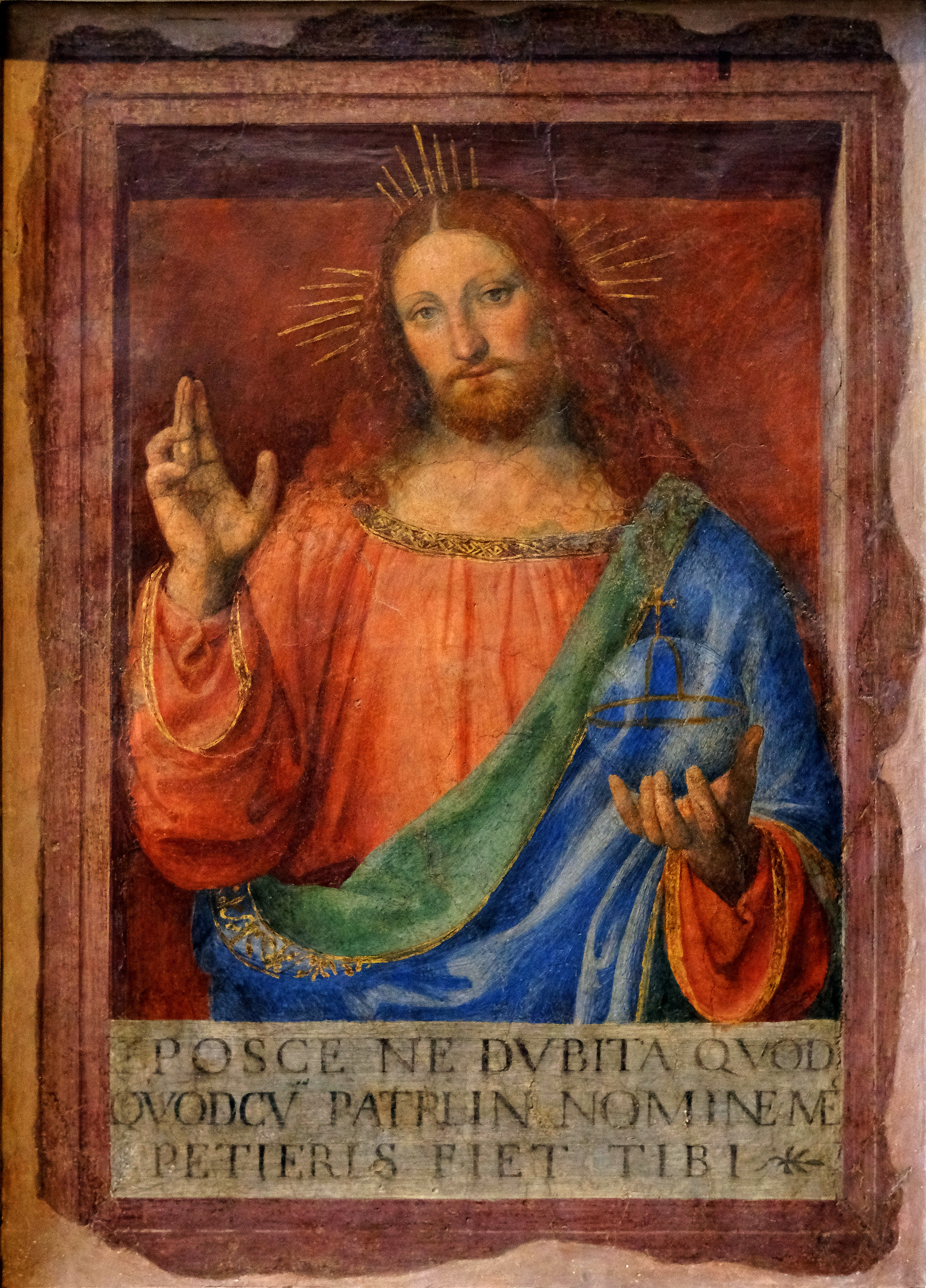 label QS:Lfr,"Le Christ bénissant"